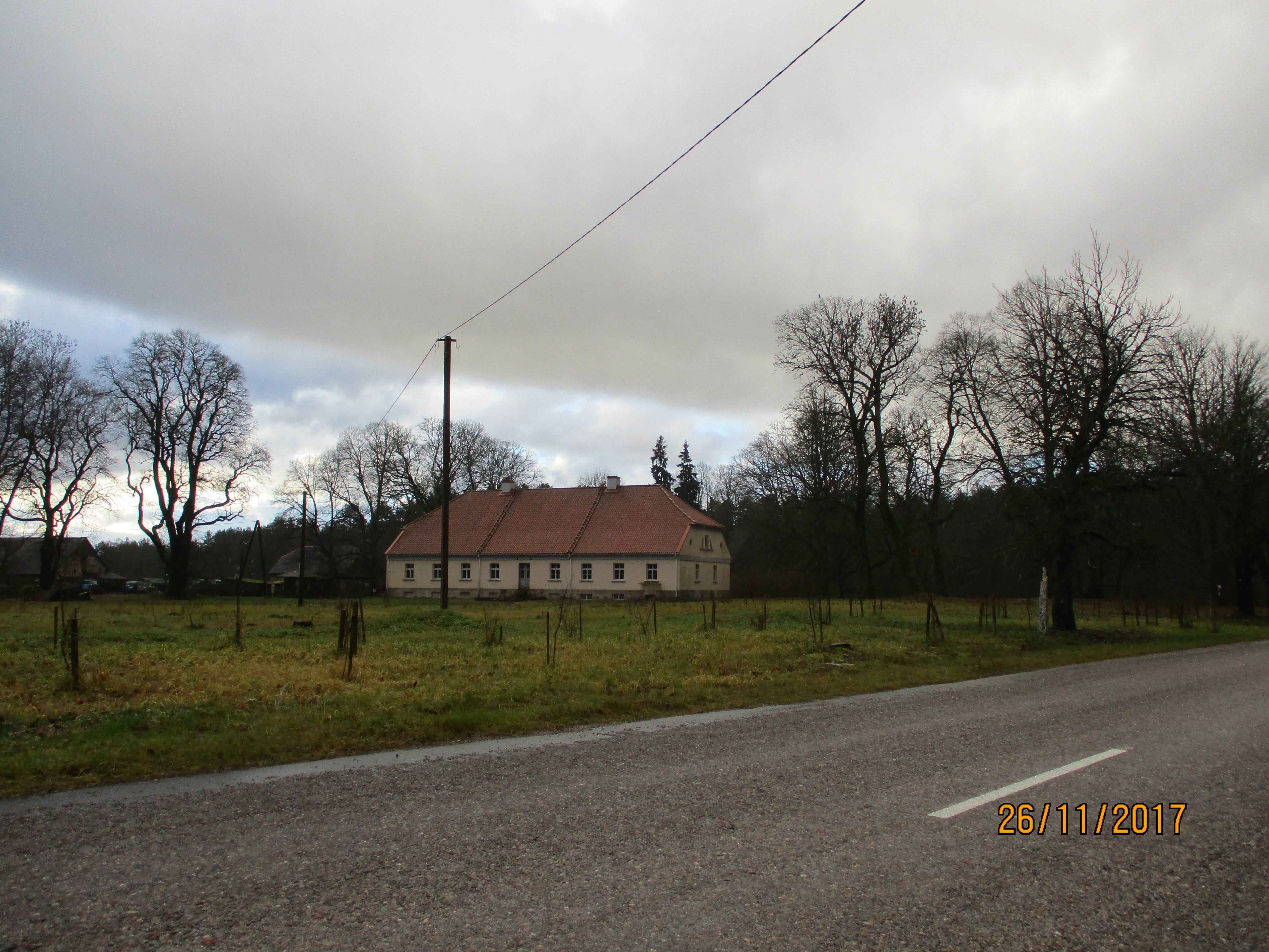 Vana luteri kiriku pastoraat, mis nüüd on remonditud. Ees välisukse juures asus vanasti avar sissepääsuga veranda.